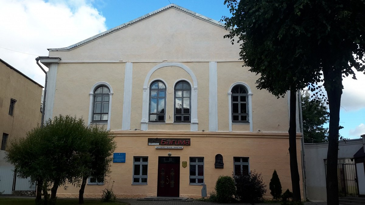 Магілёў. Палац архіепіскапа Станіслава Богуш-Сестранцэвіча